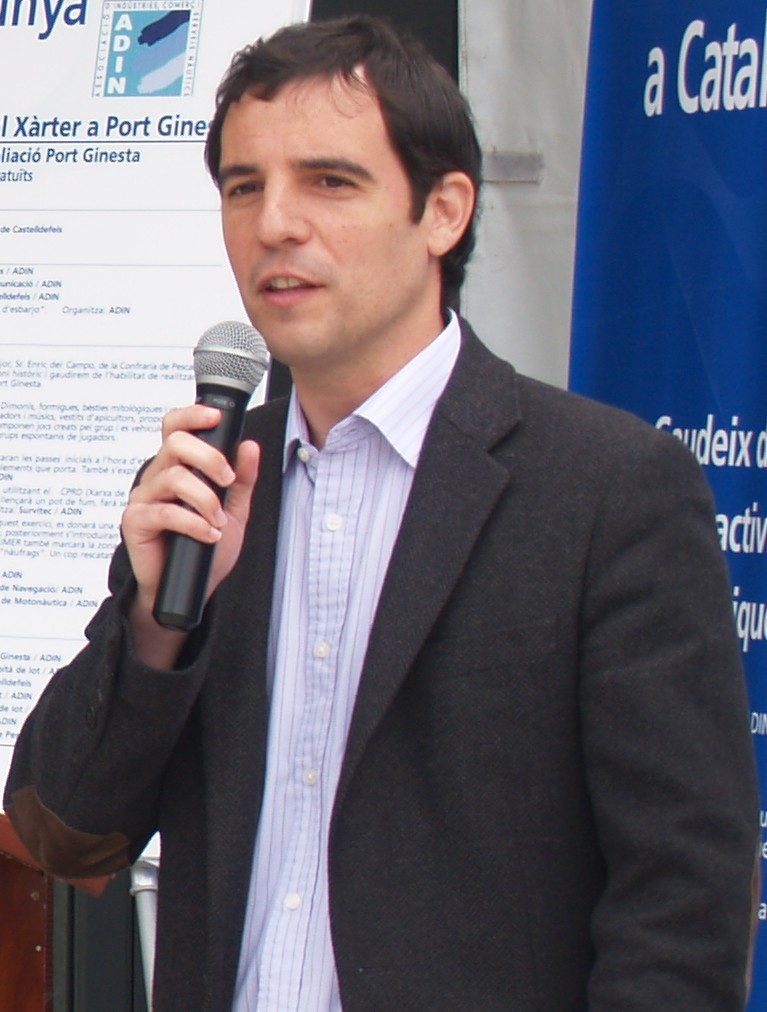 Manuel Reyes López, alcalde de Casteldefels (Barcelona) por el Partido Popular